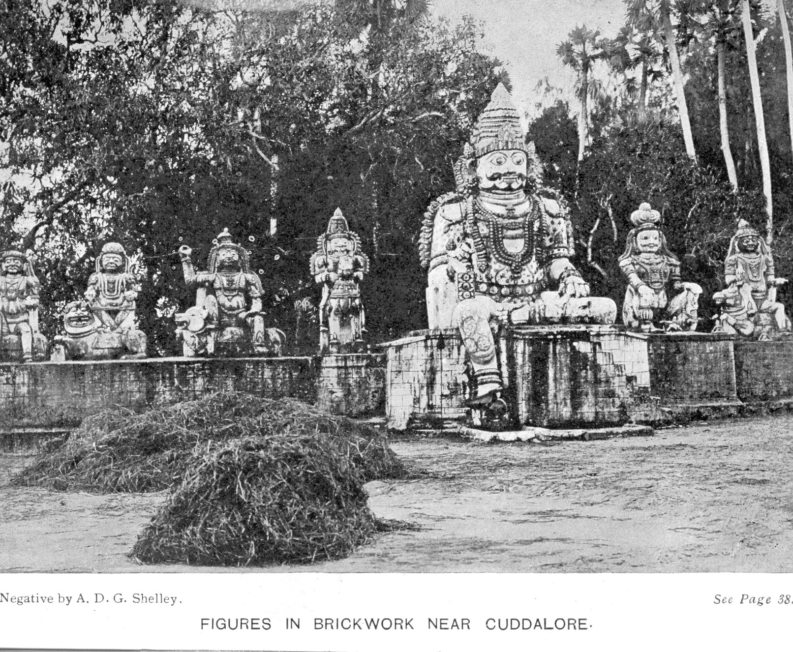 Cuddalore